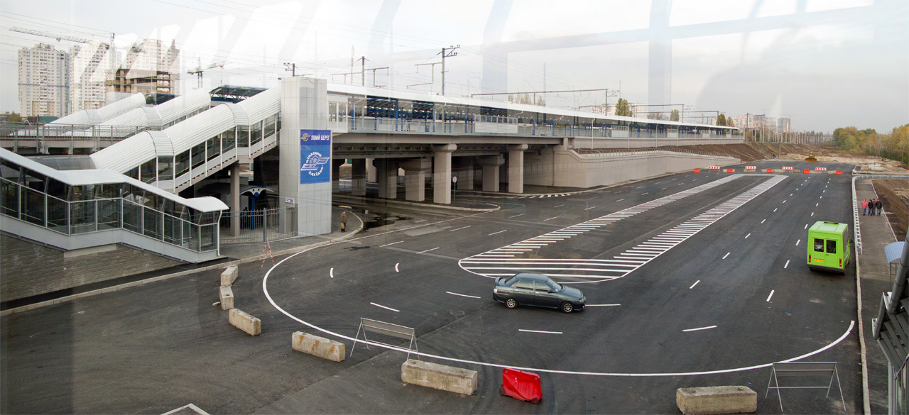 Зупиночний пункт Лівий Берег